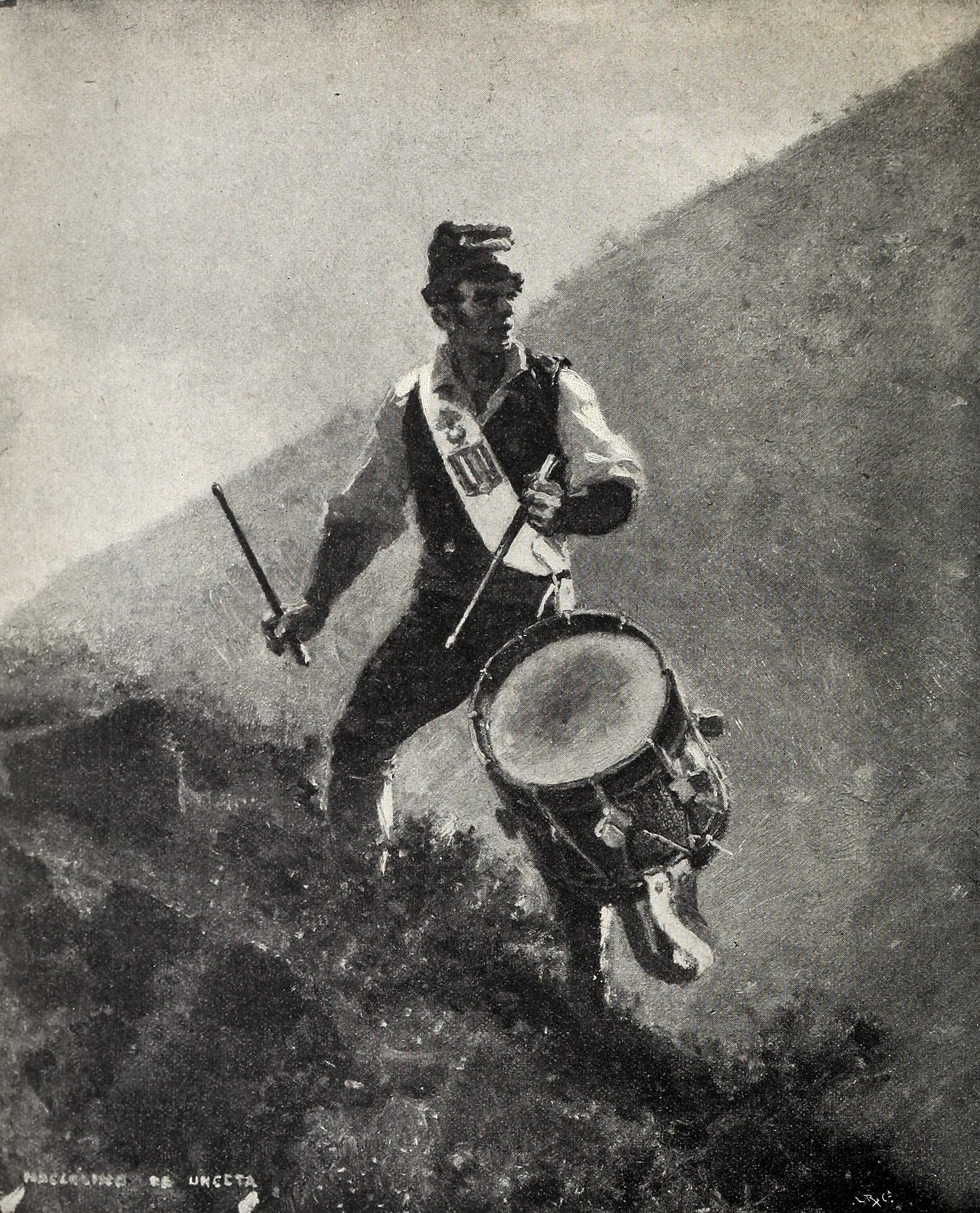 Efemérides patrióticas. 6 junio 1808. El tambor del Bruch.